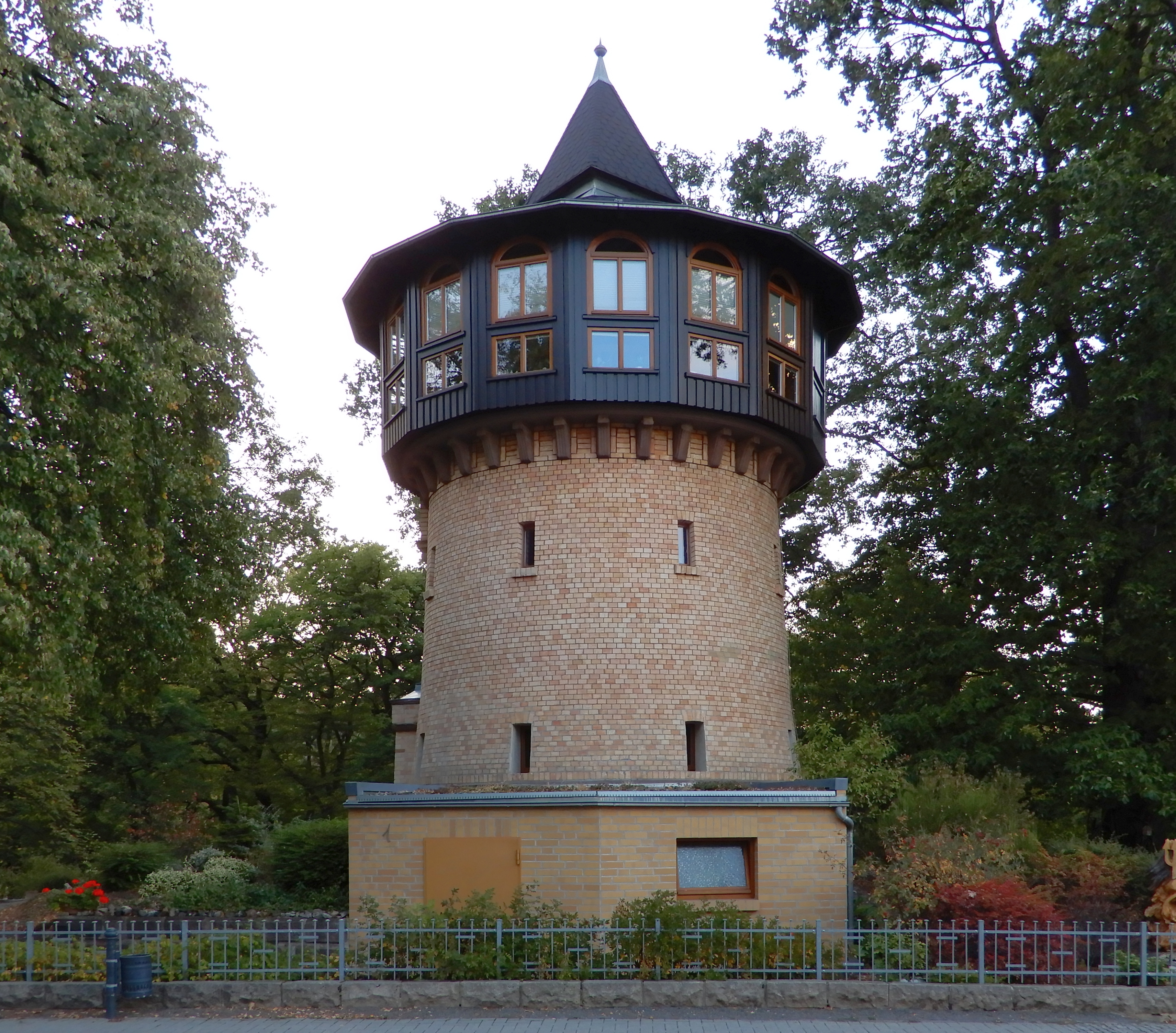 Ehemaliger Wasserturm Hubertusstraße 1, Thale